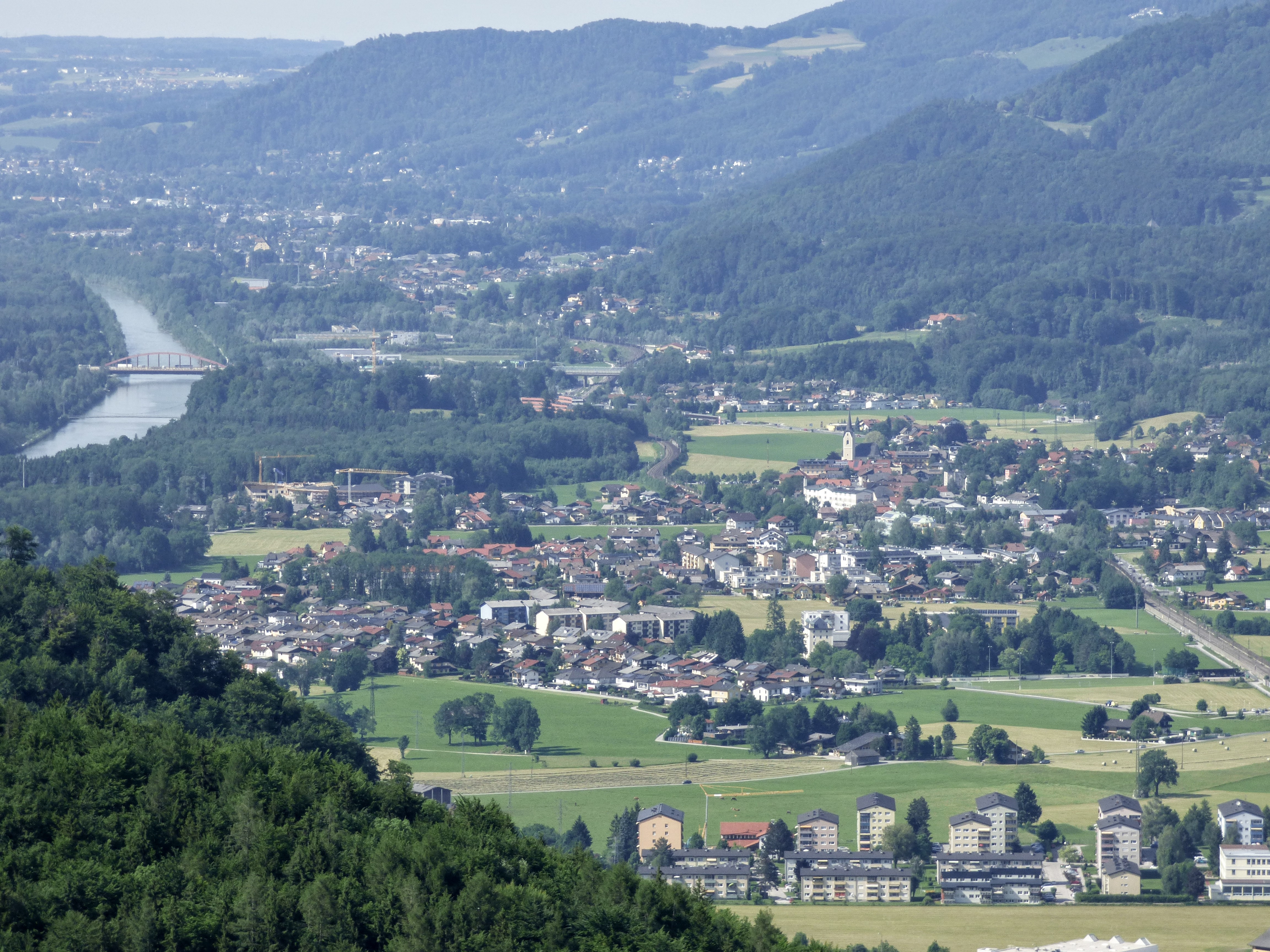 Blick von Dürrnberg (Hallein) auf Puch bei Hallein